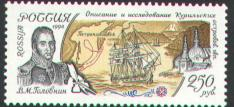 марка